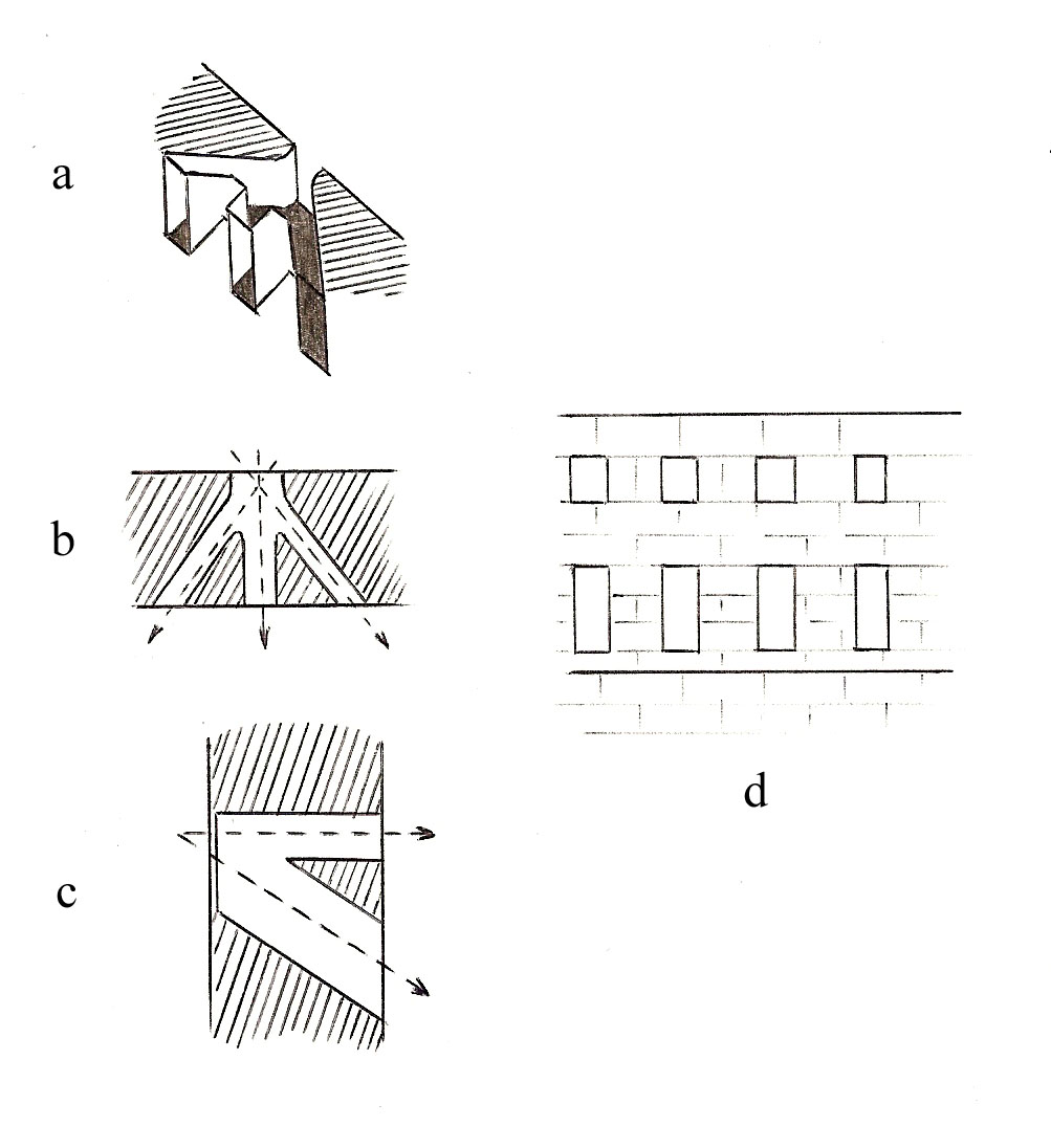 description d'une meurtrière de forteresse nubienne